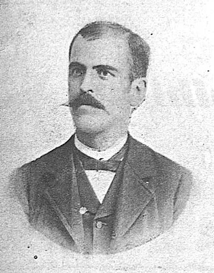 Hilario Aldea, jaimista asesinado por los radicales en San Feliu de Llobregat